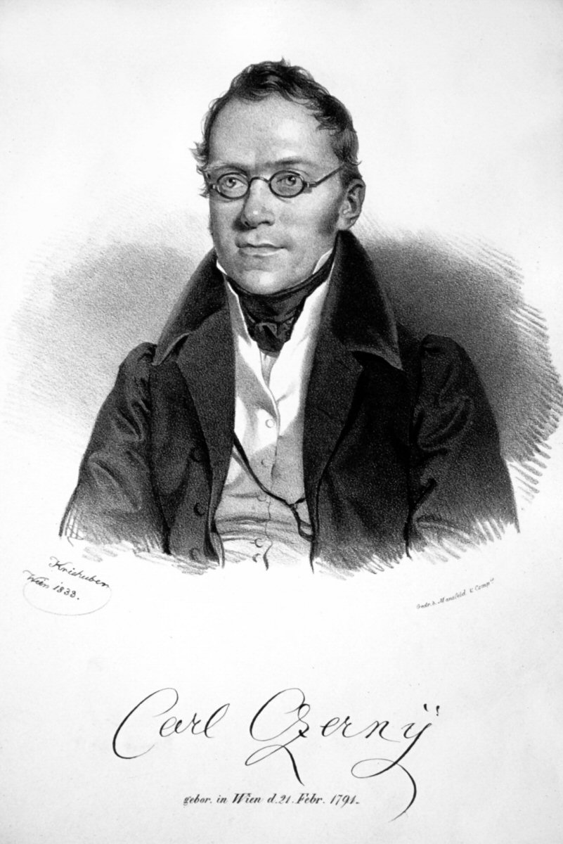 Carl Czerny, Lithographie von Josef Kriehuber, 1833